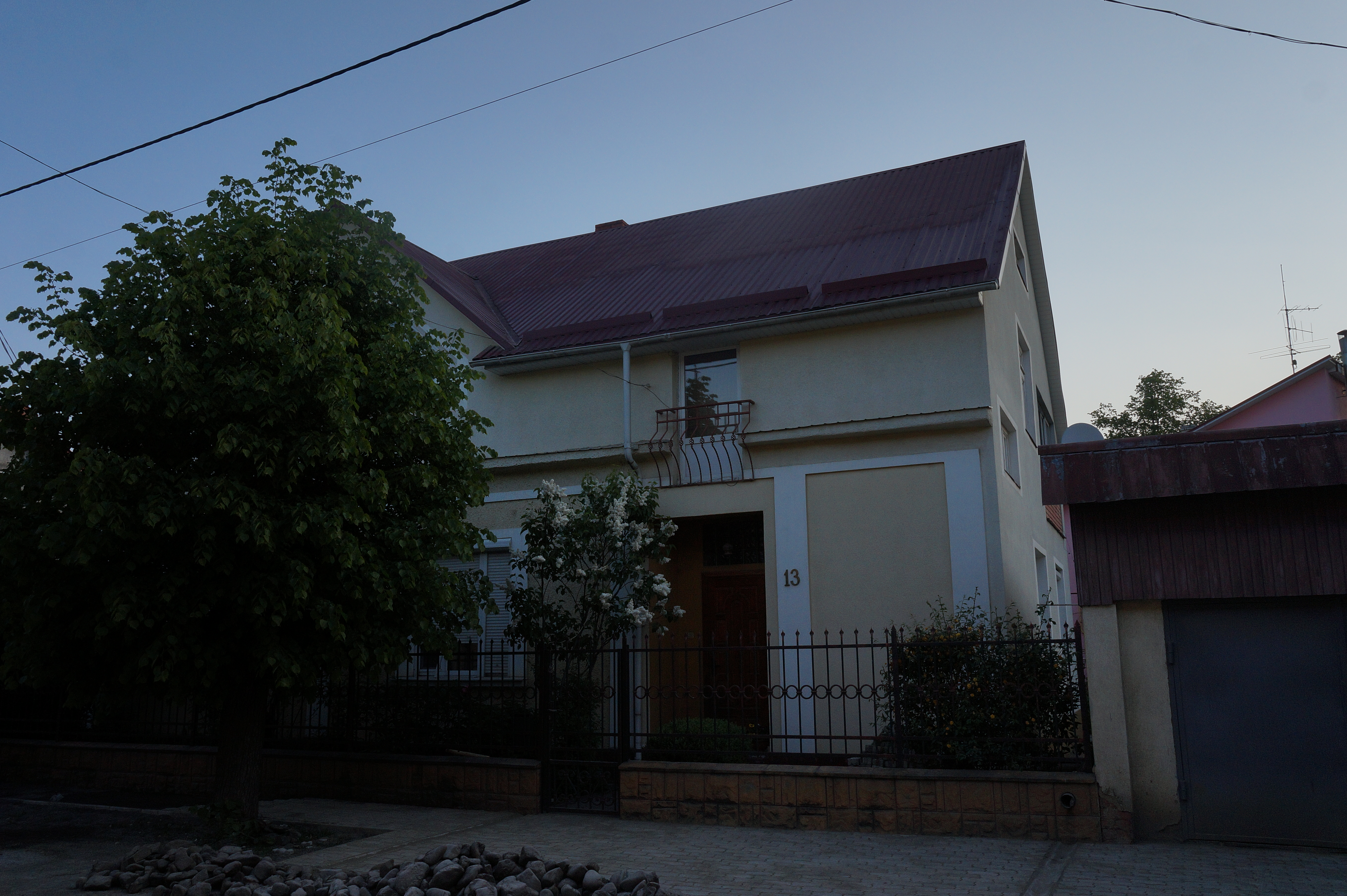 Будинок, в якому жив і працював І. Панькевич – закарпатський культурний і громадський діяч, Ужгород, вул. Павловича, 13